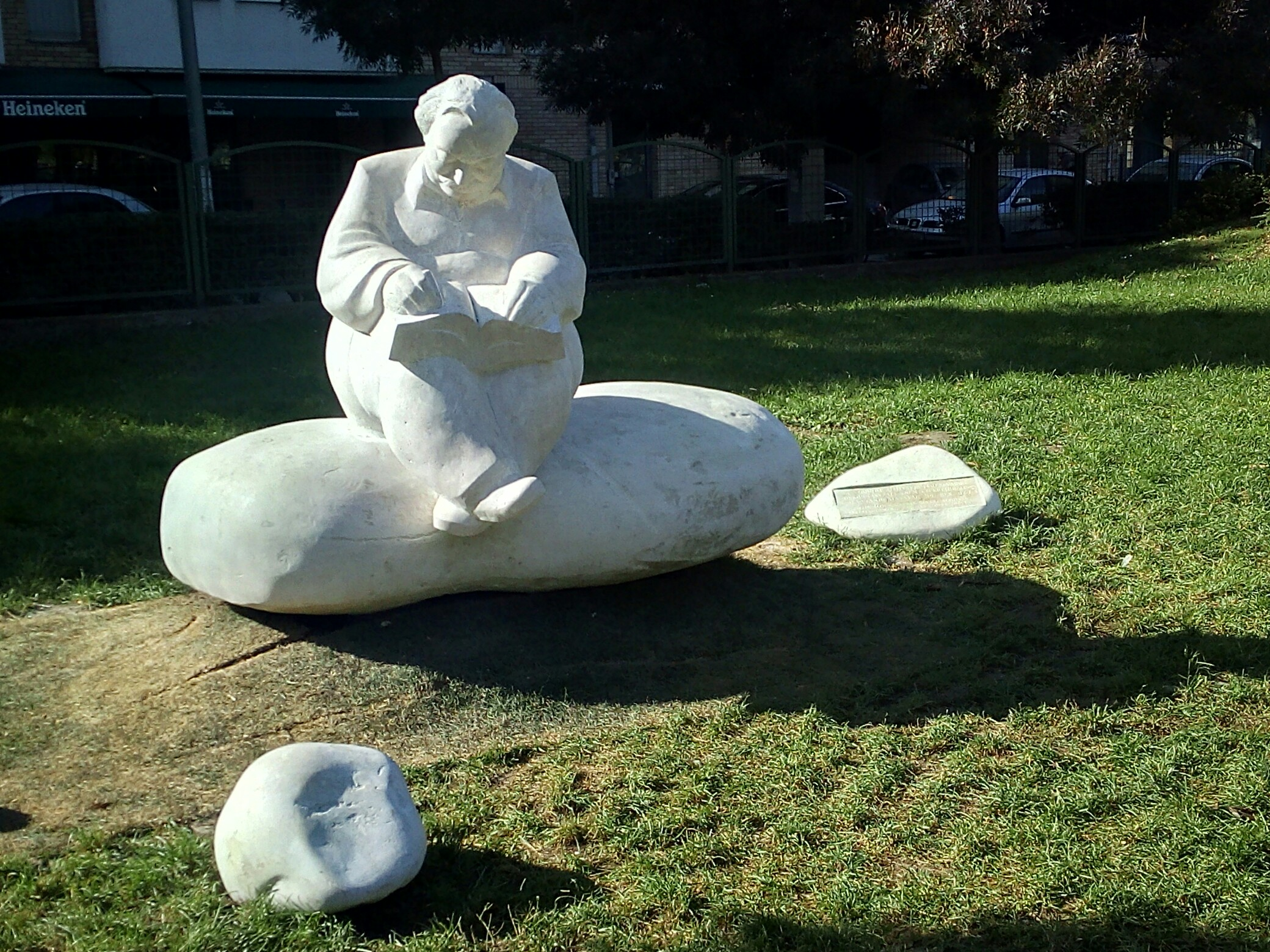 Lázár Ervin egészalakos szobra, Budapest, IX. kerület, Kerekerdő park (Klinikákhoz közel). 2017-09-30-n avatták, szobrász Pintér Attila és Kontur András.